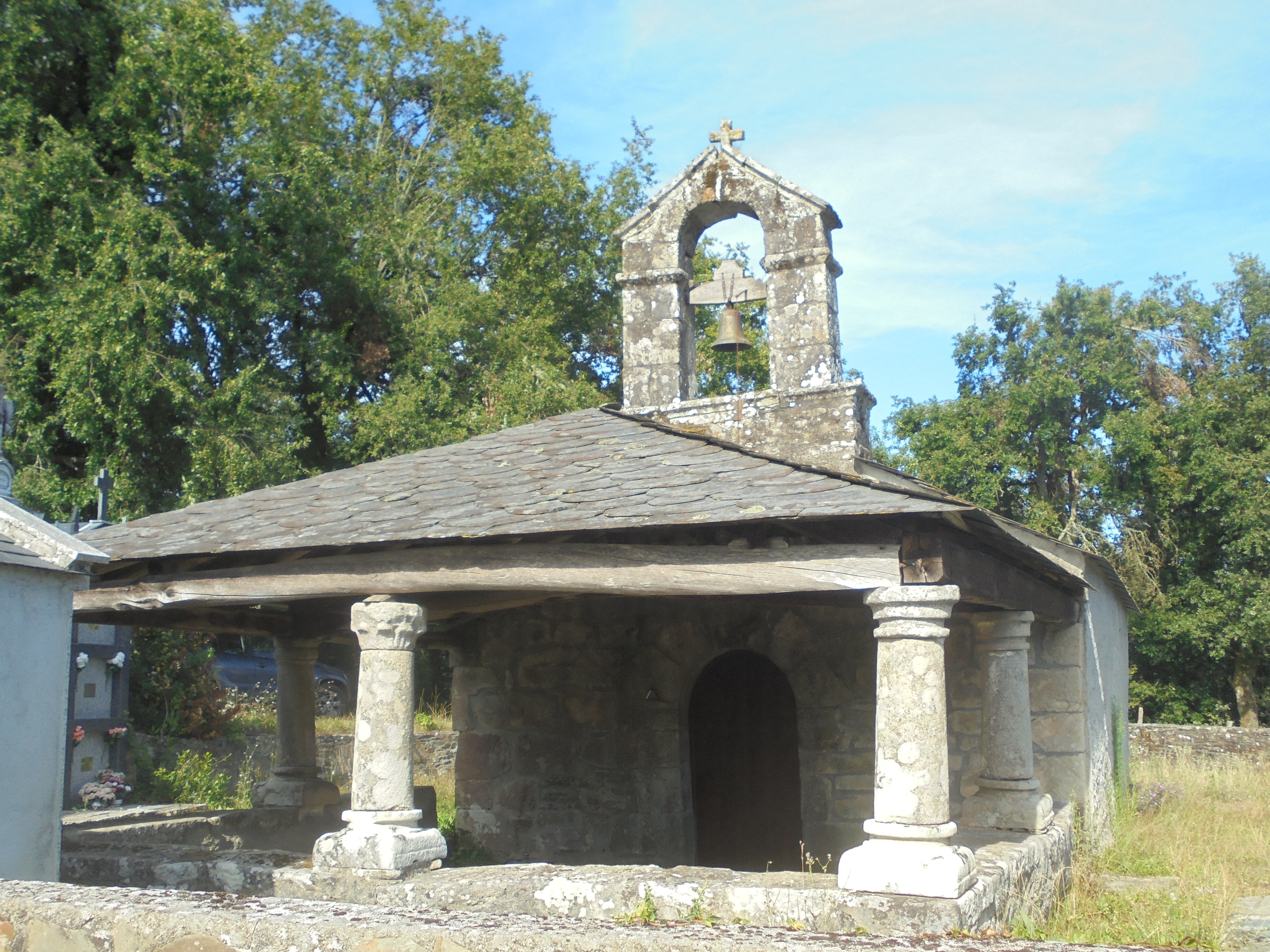 Igrexa parroquial de Lebruxo